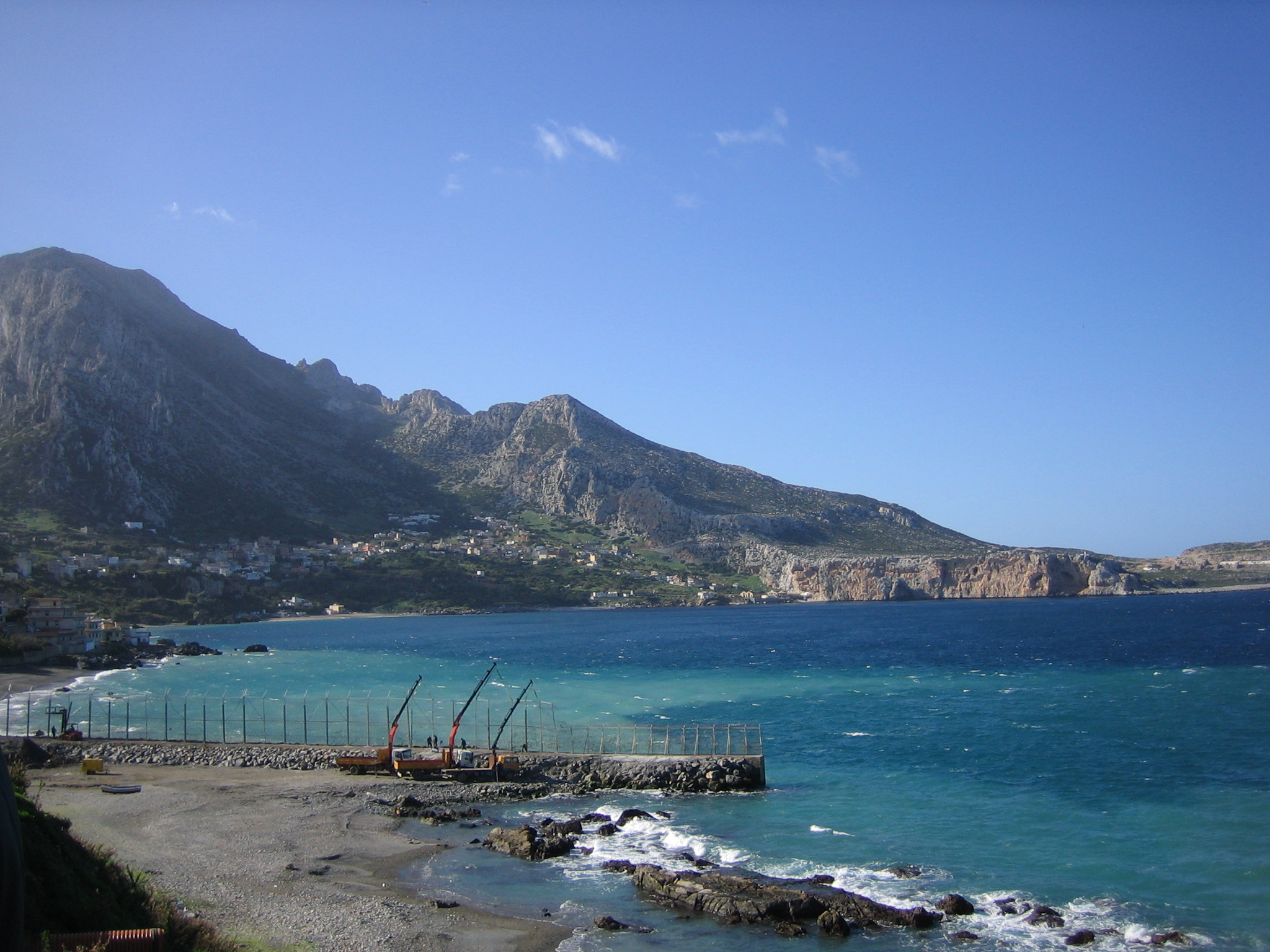 nördliches Ende der Grenzmauer zwischen der EU und Marokko (im Hintergrund)--Boernedi (talk) 10:34, 14 February 2010 (UTC)